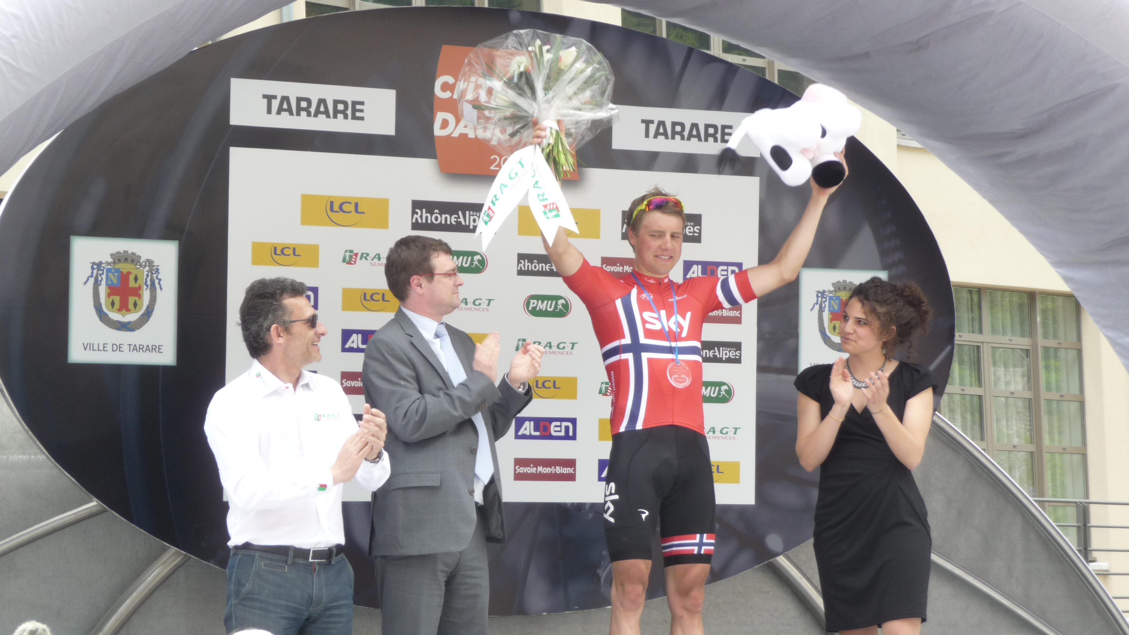 Arrivée de la 3e étape du Critérium du Dauphiné 2013 à Tarare le mardi 4 juin 2013. Podium de la 3e étape à Tarare, Edvald Boasson Hagen vainqueur de l'étape avec le maire de Tarare Thomas Chadoeuf